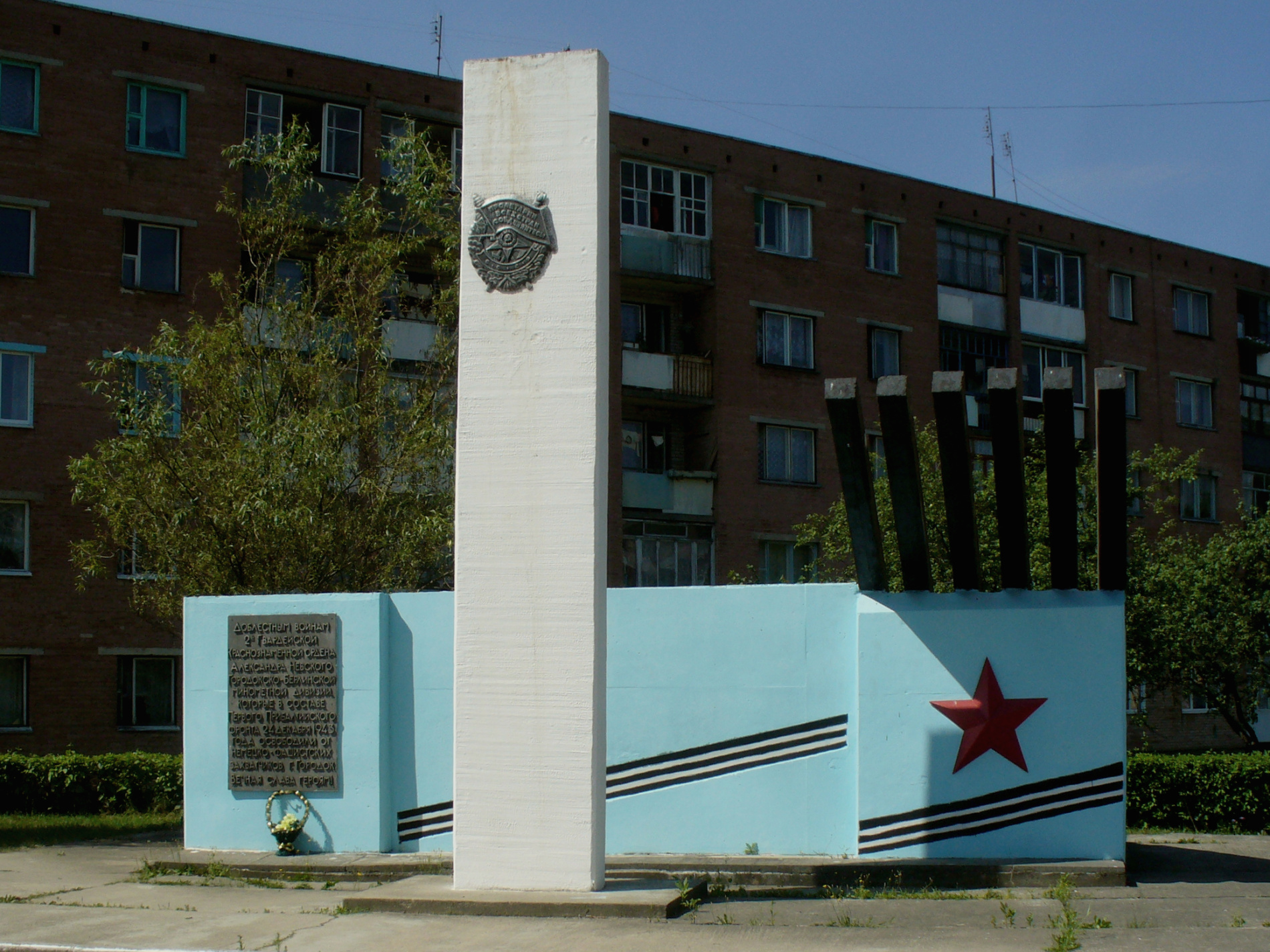 Памятник воинам 2-й гвардейской Краснознаменной ордена Александра Невского Городокско-Берлинской миномётной дивизии, отличившимся в боях за город в годы Великой Отечественной войны.